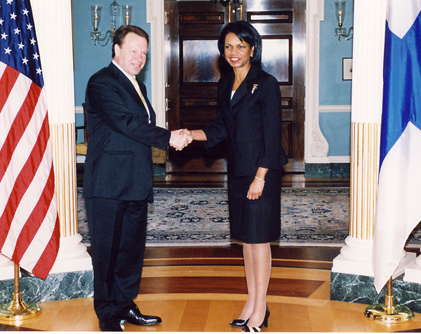 Condoleezza Rice and Ilkka Kanerva.